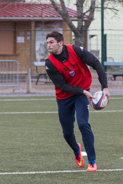 Xavier Mignot durant un entraînement du FC Grenoble